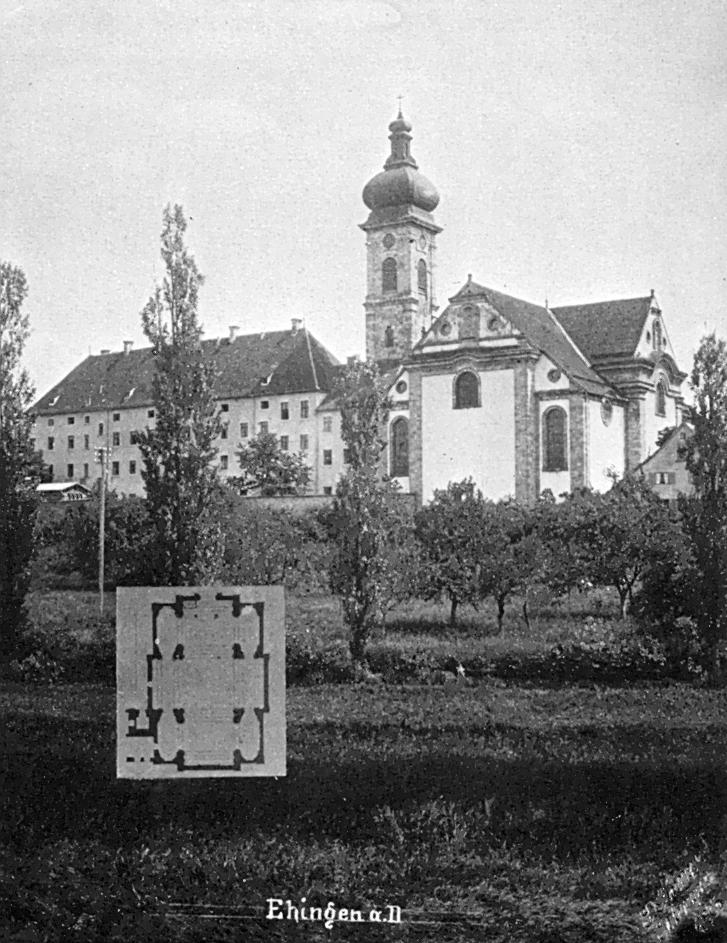 Barockkirche in Ehingen